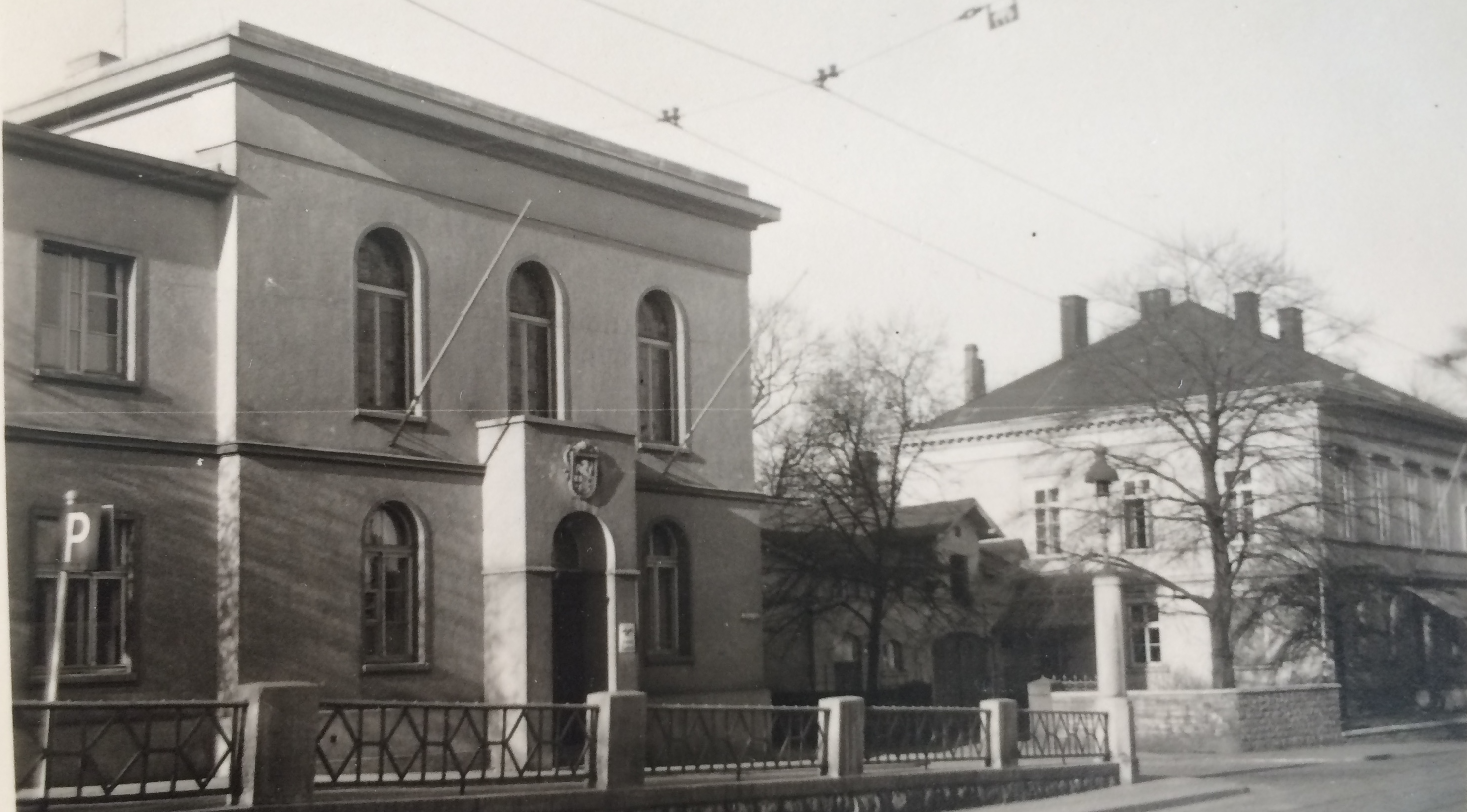 Ansicht des Landratsamts (links) und der Dienstvilla des Landrats (rechts) des Kreises Iserlohn, Aufnahme von 1940